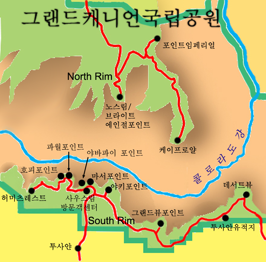 그랜드캐니언 국립공원 약도